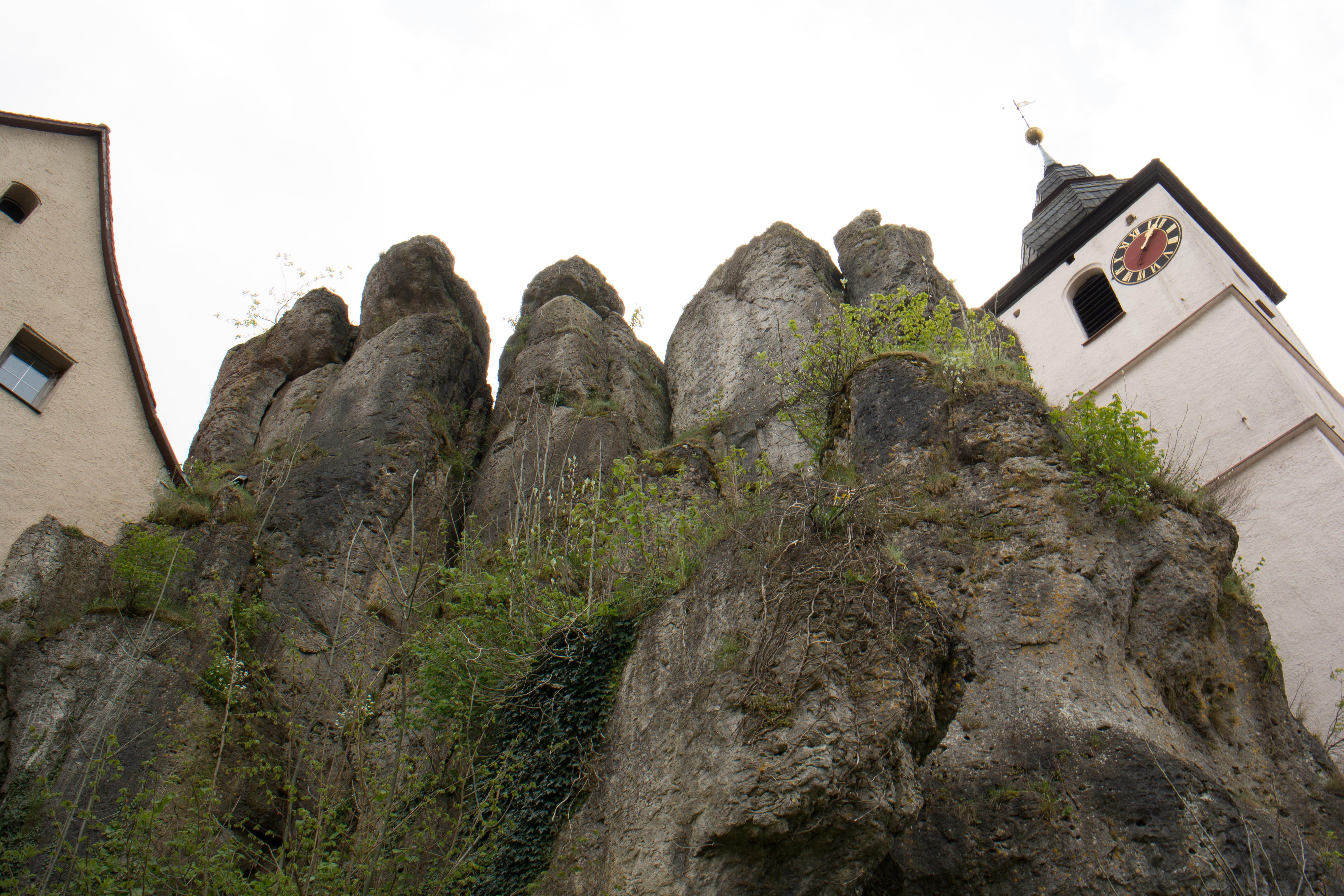 Geotop Kirchfelsen in Hiltpoltstein